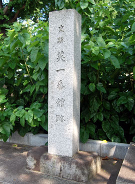 『史跡 英一番館跡』、シルクセンター入口